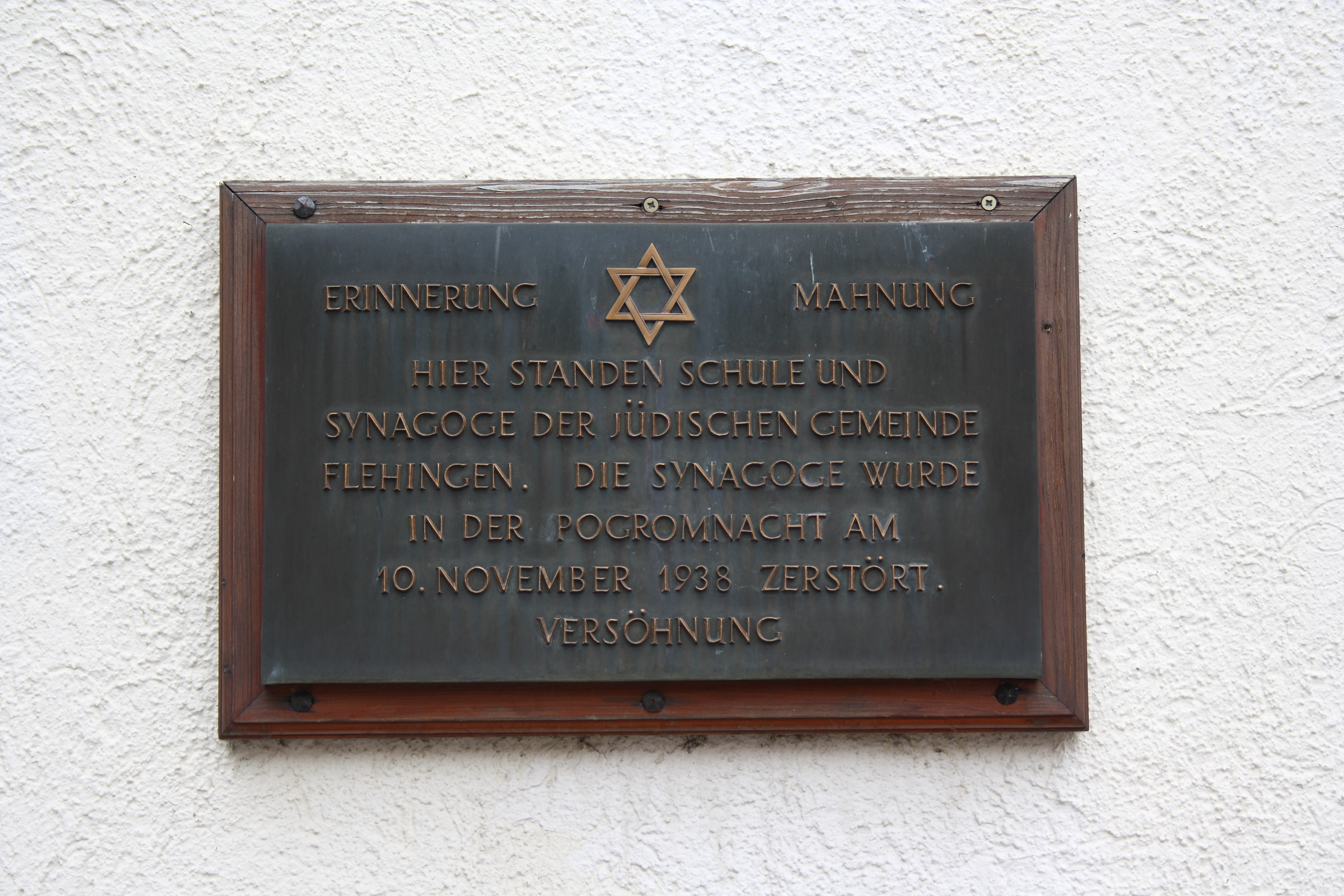 Gedenktafel für die 1938 zerstörte Neue Synagoge in Flehingen, Gochsheimer Straße 14